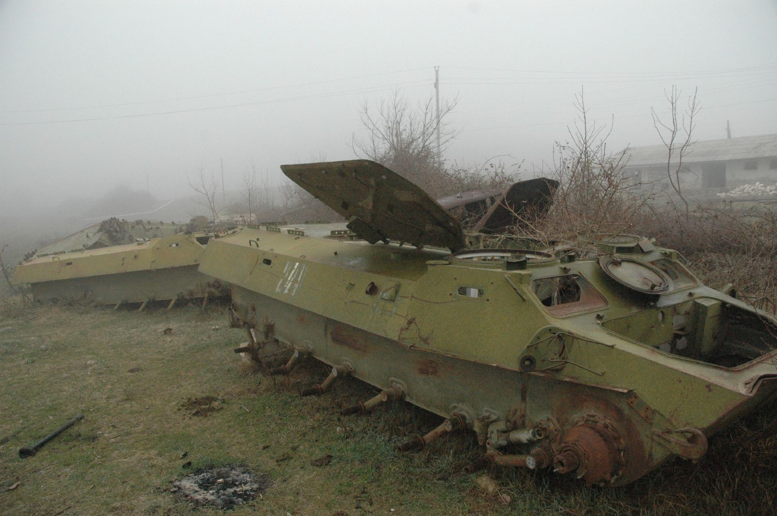 Azeri tanks in Nagorno-Karabakh